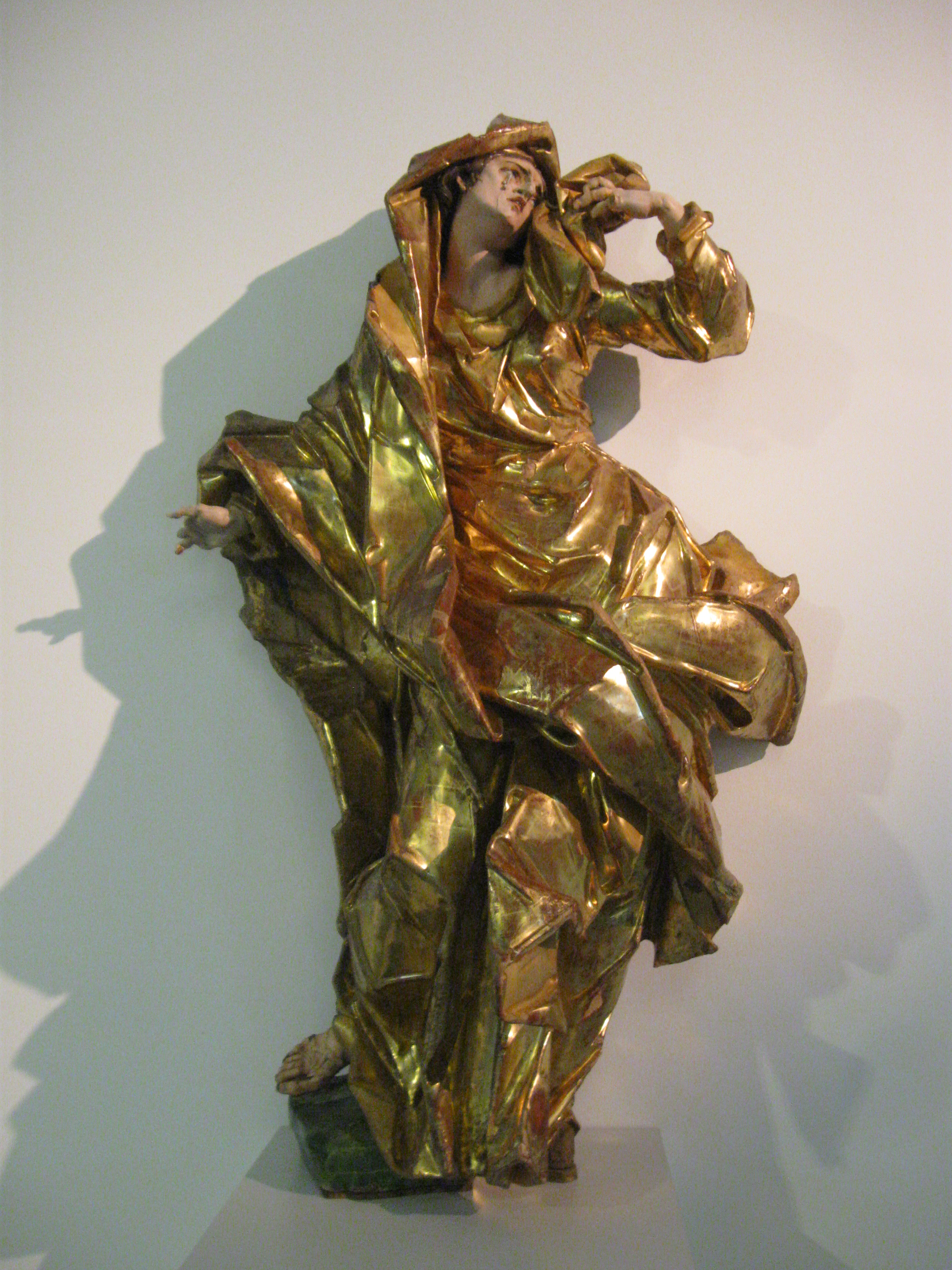 Іван Георгій Пінзель. "Богоматір" (кін. 1750-х. Костел у Годовиці. Липове дерево, поліхромія, левкас, позолота. Львівська національна галерея мистецтв ім. Бориса Возницького) Виставка "Велике і Величне". Мистецький арсенал. 2013